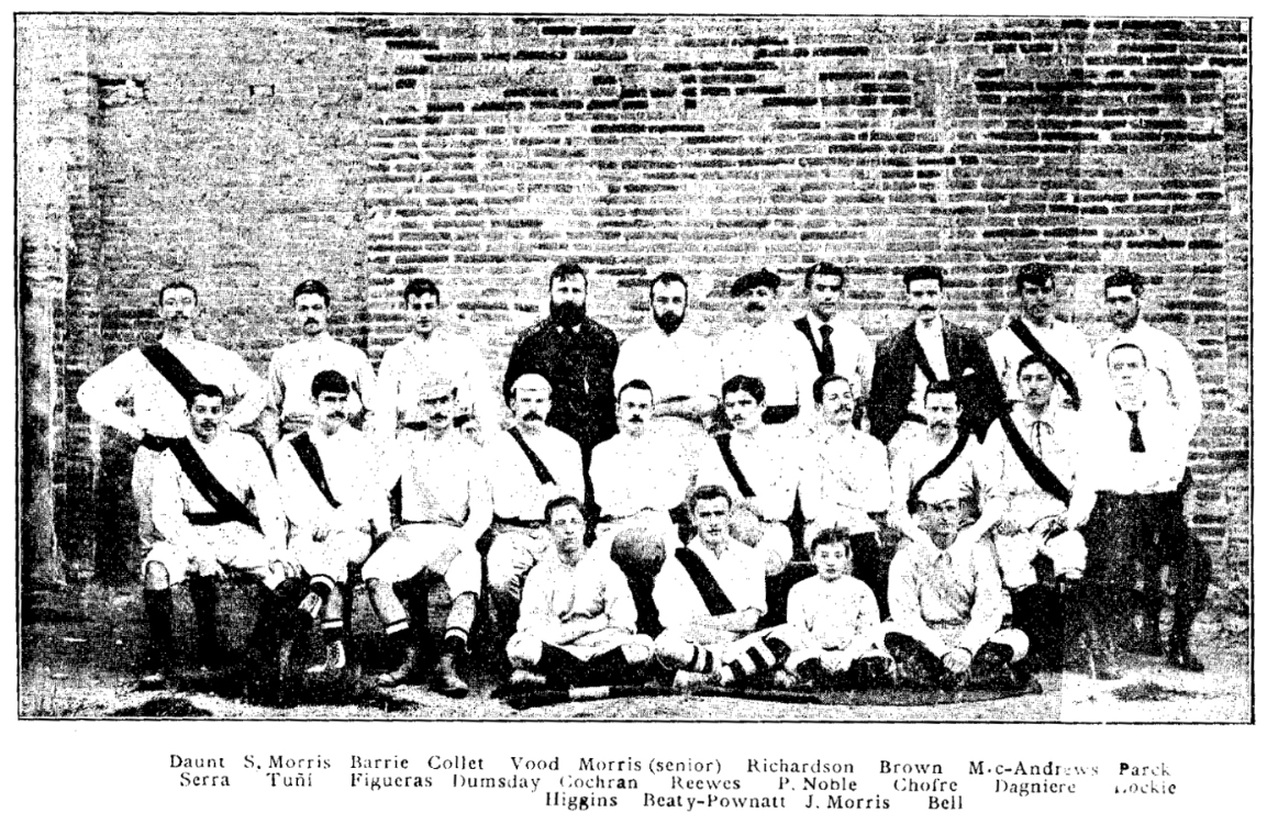 Instantània de l'històric Barcelona Foot-ball Club, un dels primers equips formats a Barcelona, integrat bàsicament per membres de la colònia britànica.